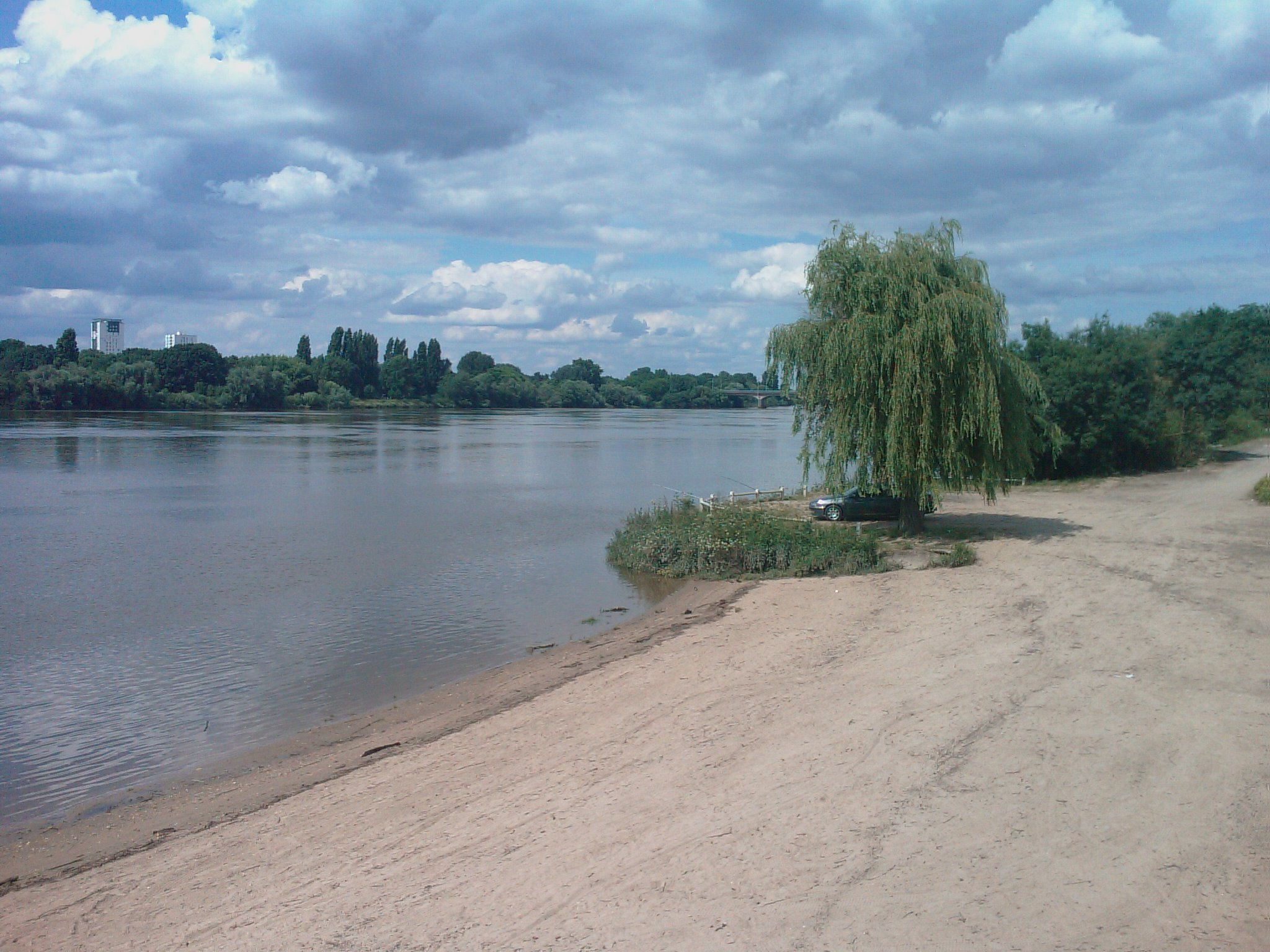 Bord de Loire à Saint-Sébastien-sur-Loire, Loire-Atlantique, France